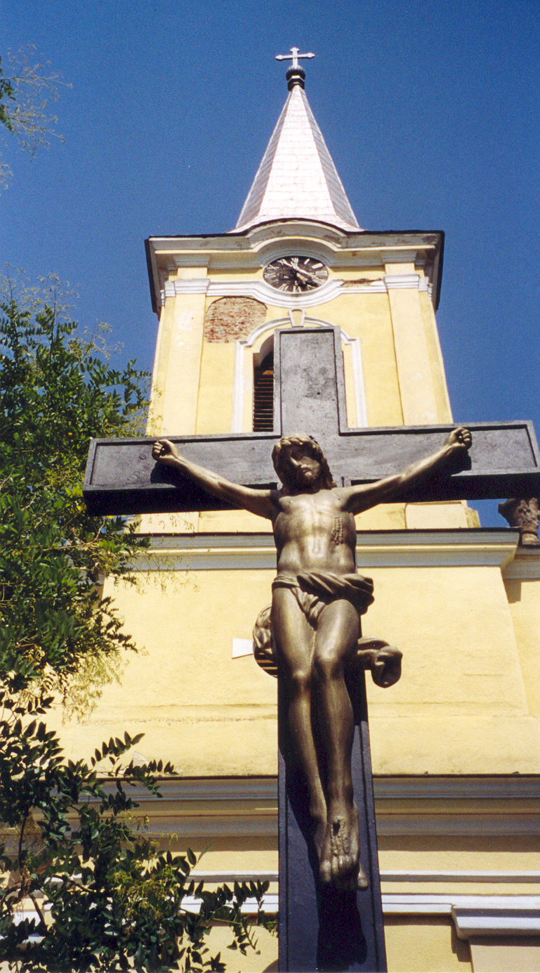 Kirche church Neubeschenowa Banat Rumaenien Romania